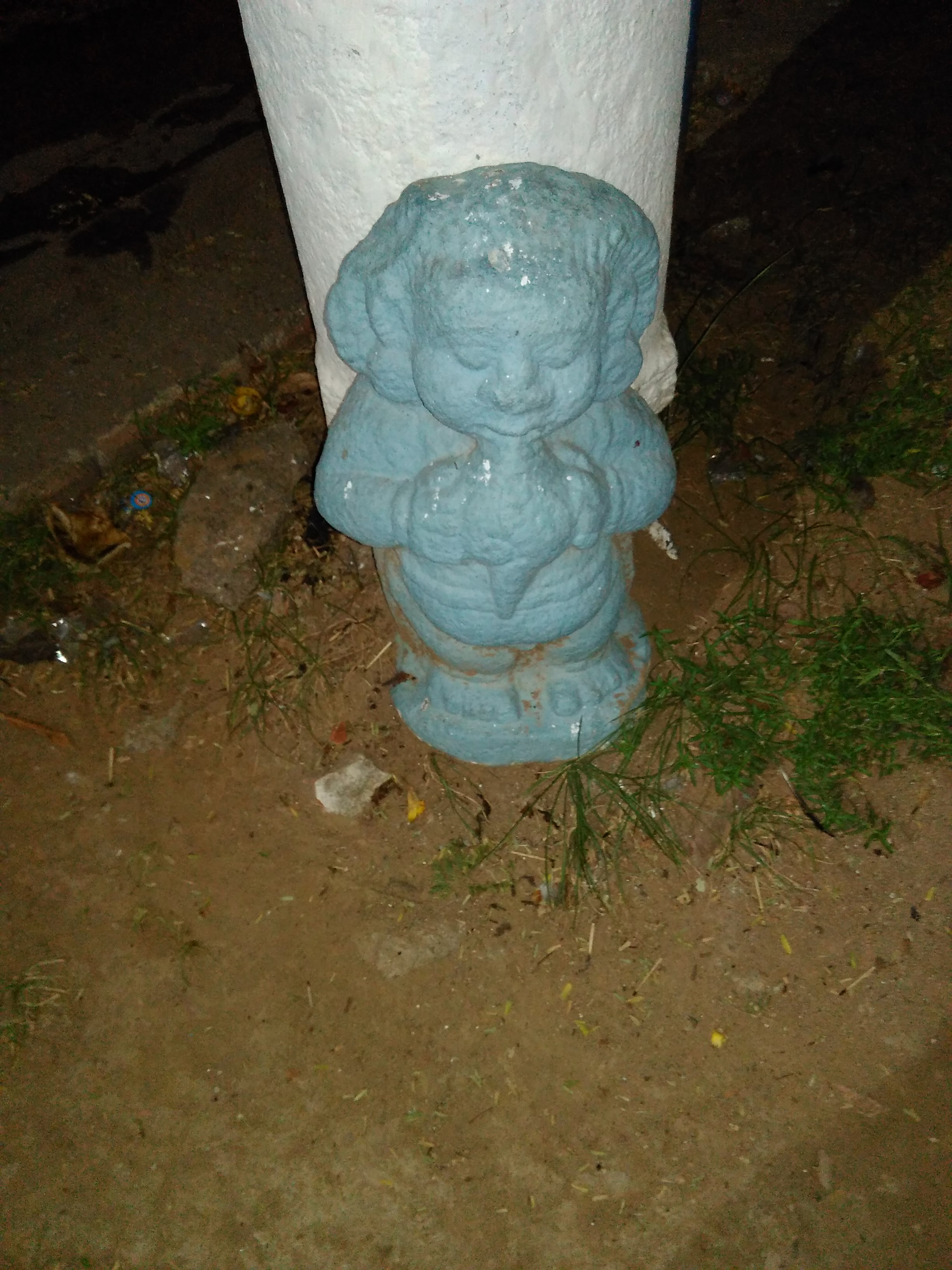 it is called sanga nithi in tamil temple culture